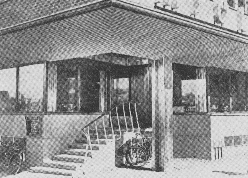 Bröderna Hedlunds industribyggnad, hörnentrén och mjölkbaren